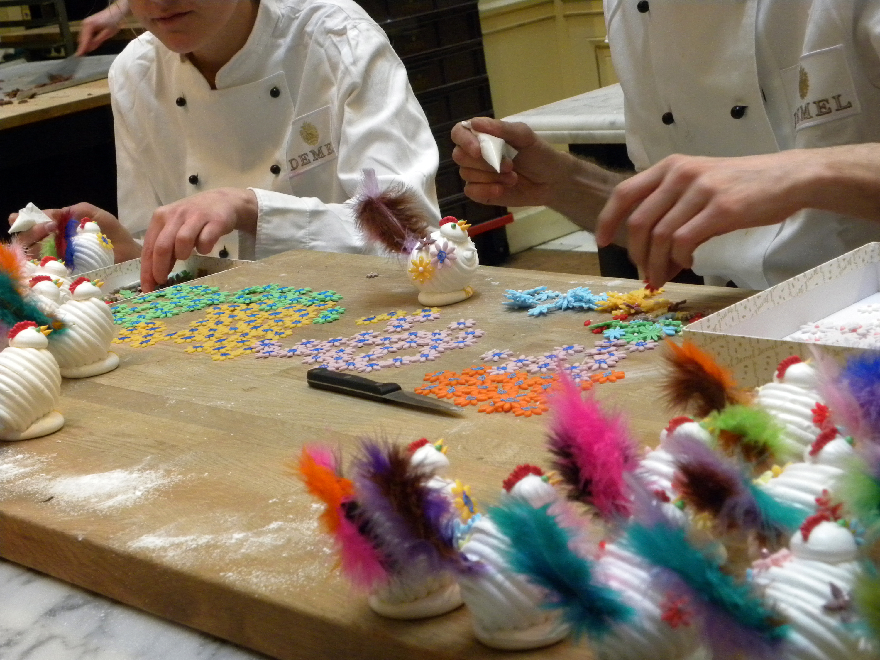 Beim Verzieren der Ware kann man im Demel zuschauen.